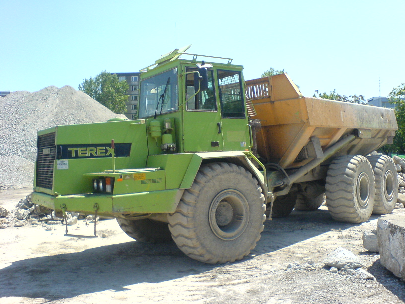 Terex 2566 B - Führerhaus im Vordergrund